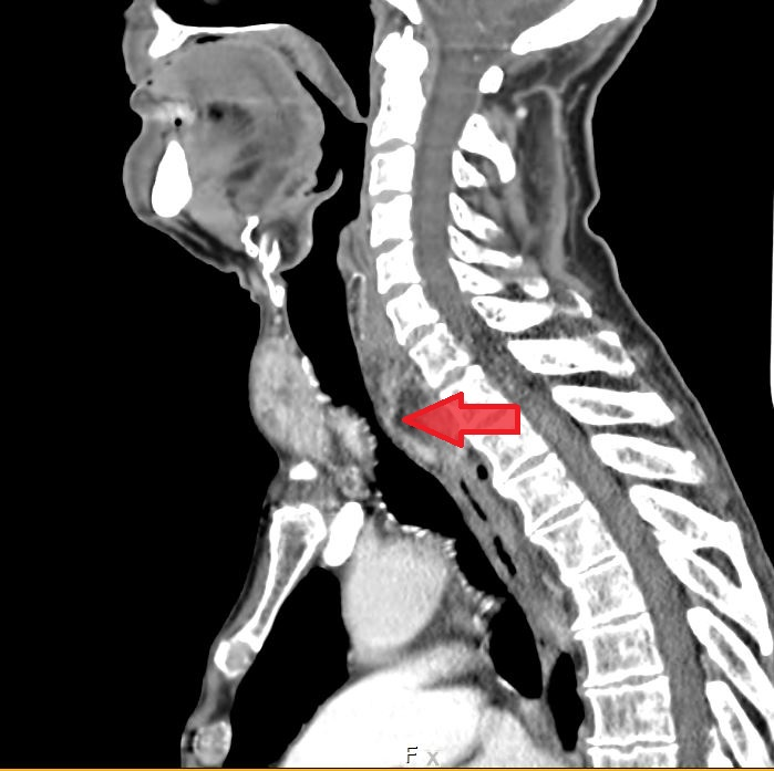 Tomodensitométrie avec injection de produit de contraste iodé montrant un volumineux goitre, qui comprime la trachée cervicale.